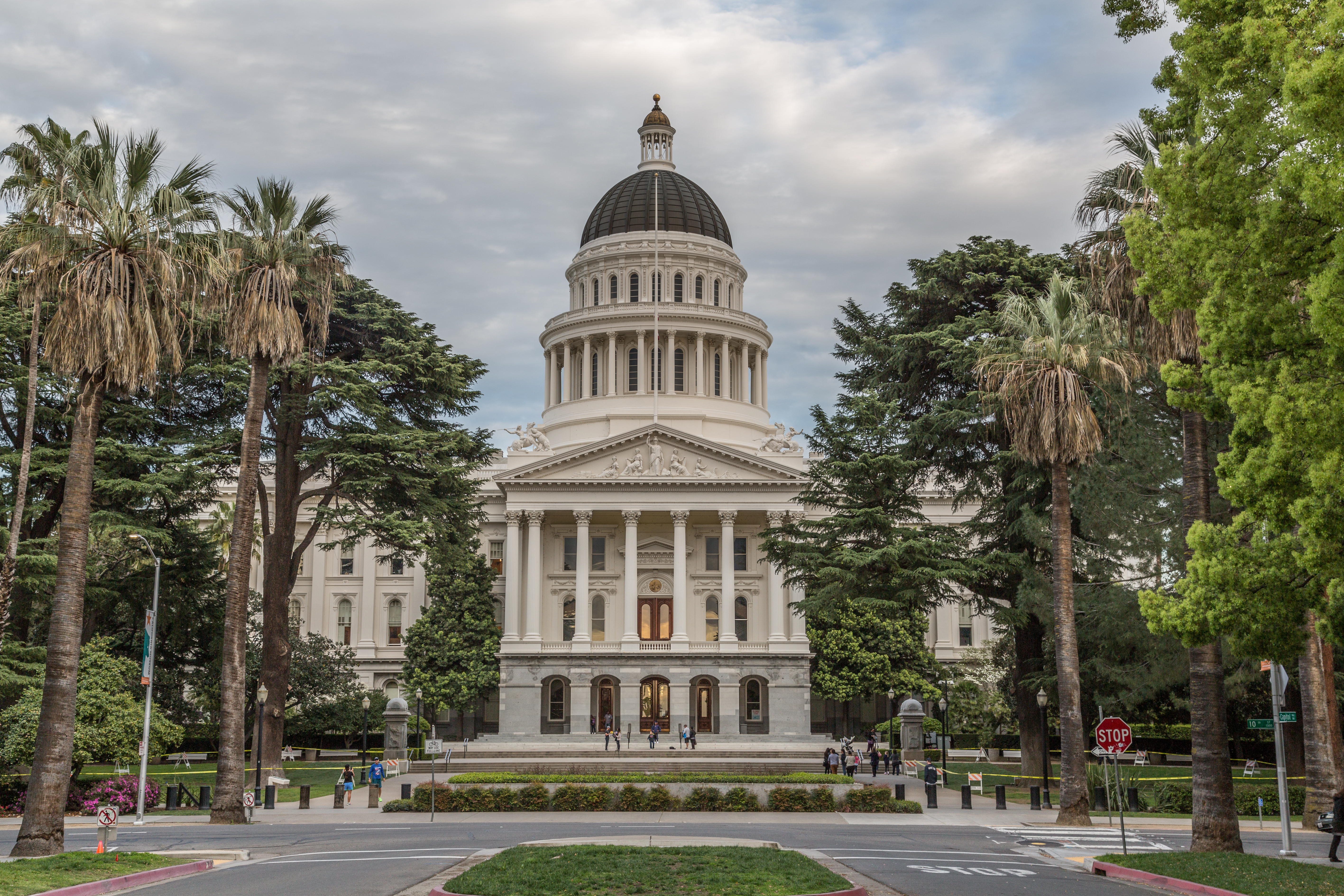 Sacramento, California